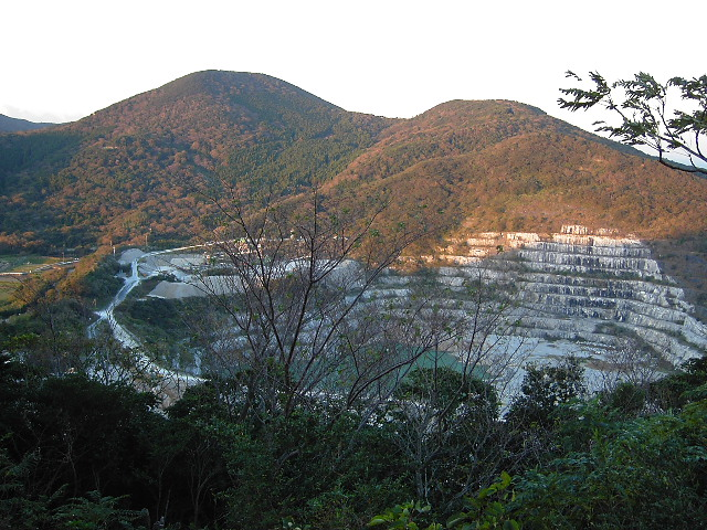 蔵王山側から衣笠山